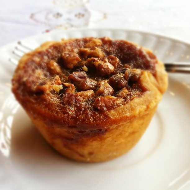 Pecan butter tart.